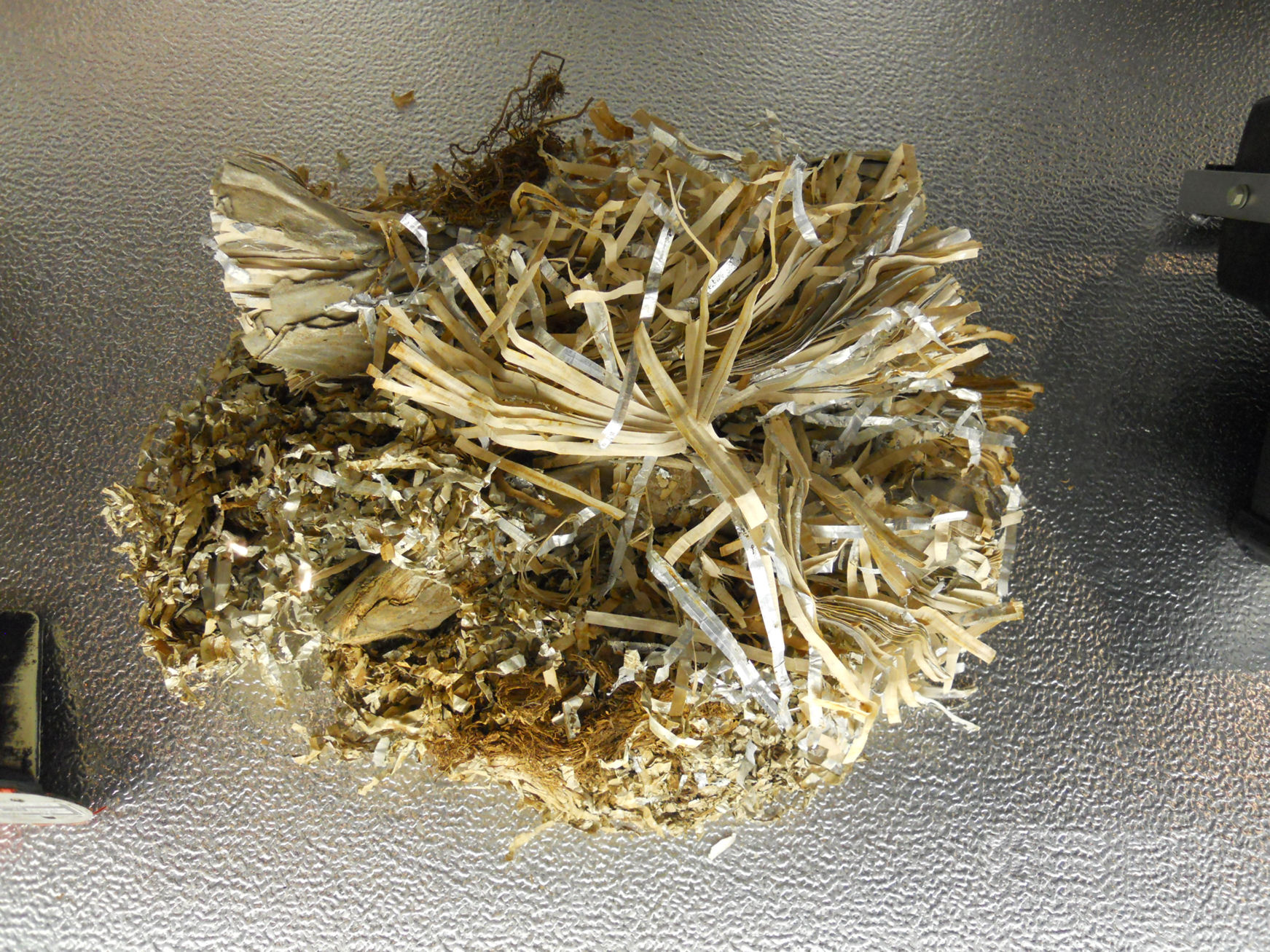 Original eines britischen Window-Radartäuschmittel